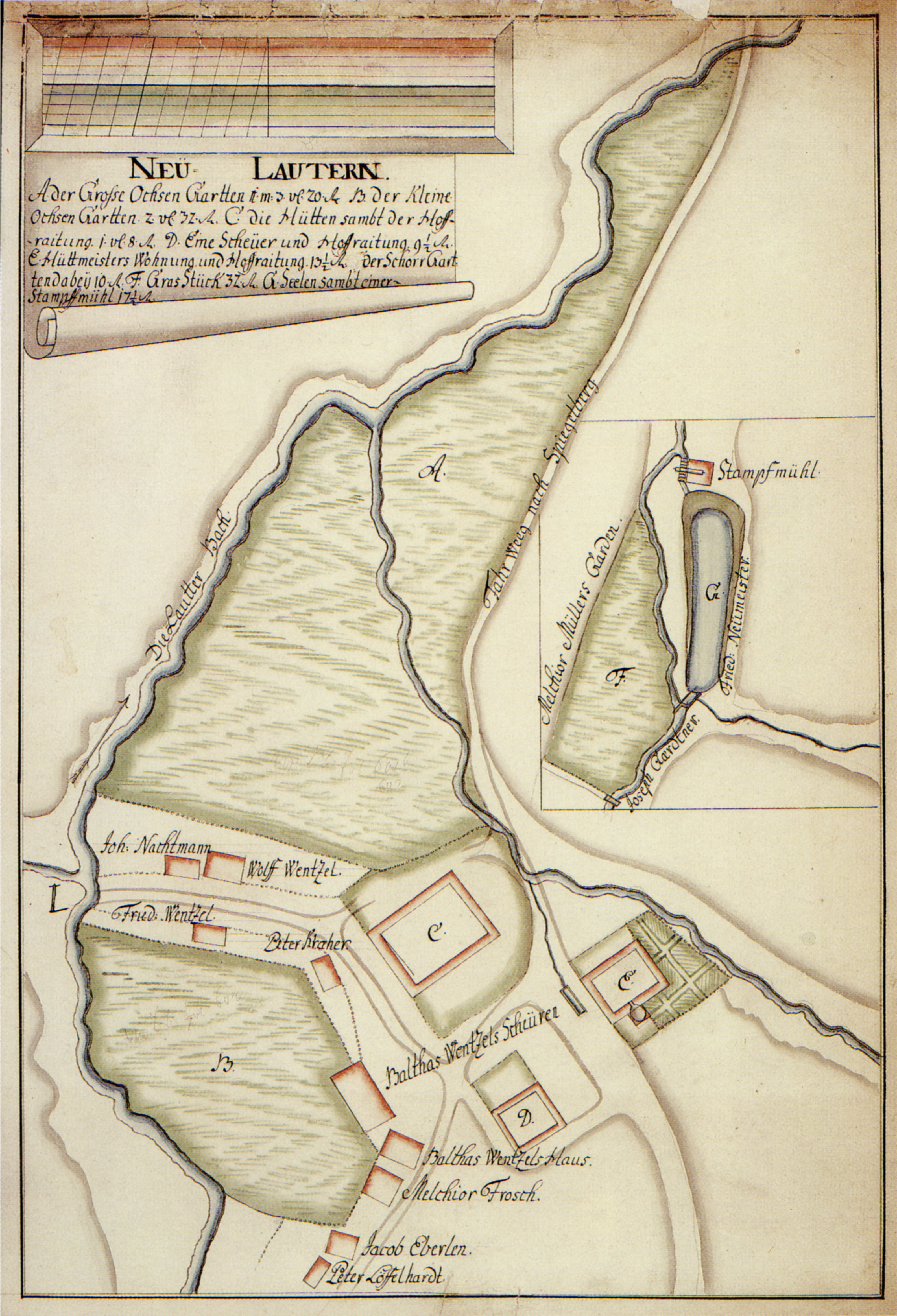 Lageplan Neulauterns, heute Gemeinde Wüstenrot, im 18. Jahrhundert